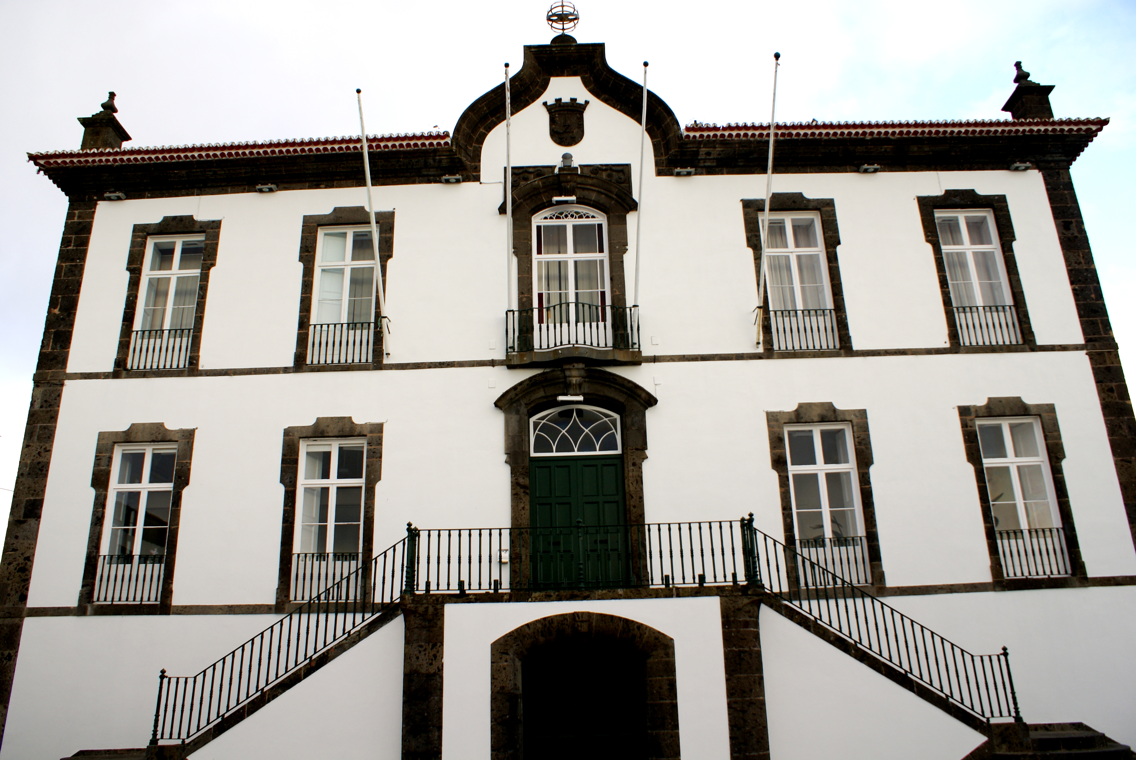 Paços do Concelho de Vila Franca do Campo, ilha de São Miguel, Açores